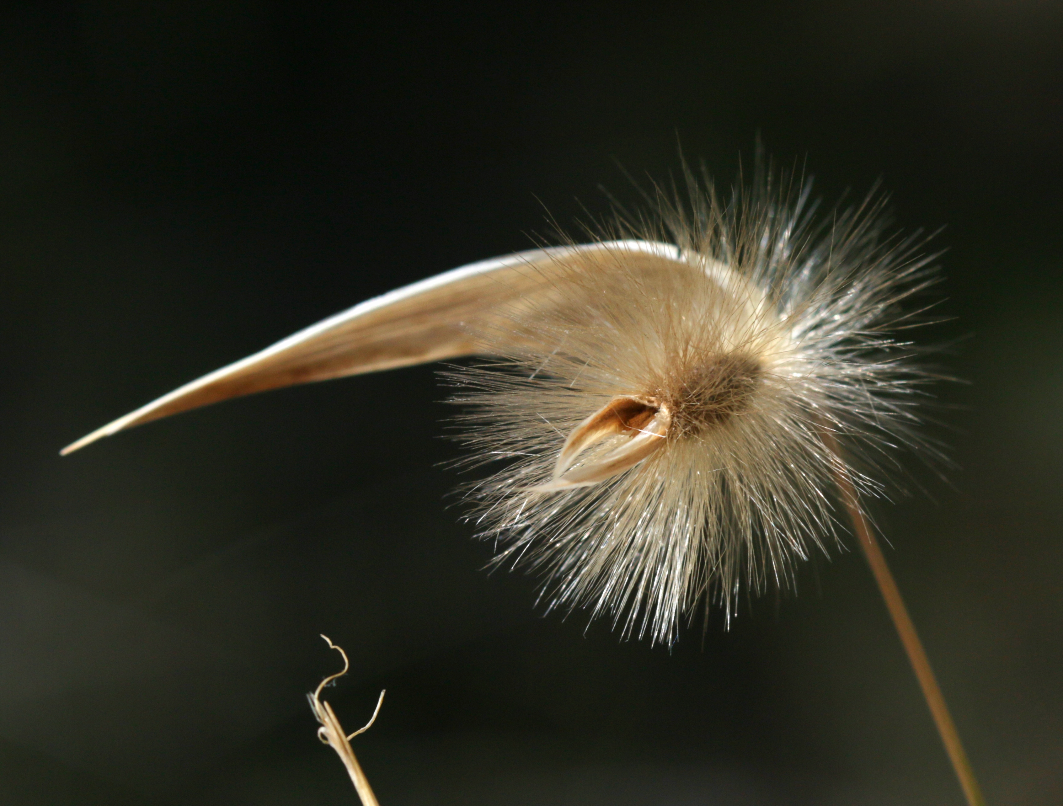 Santuario de Ntra. Sra. del Pueyo, Belchite, Aragon, Spain